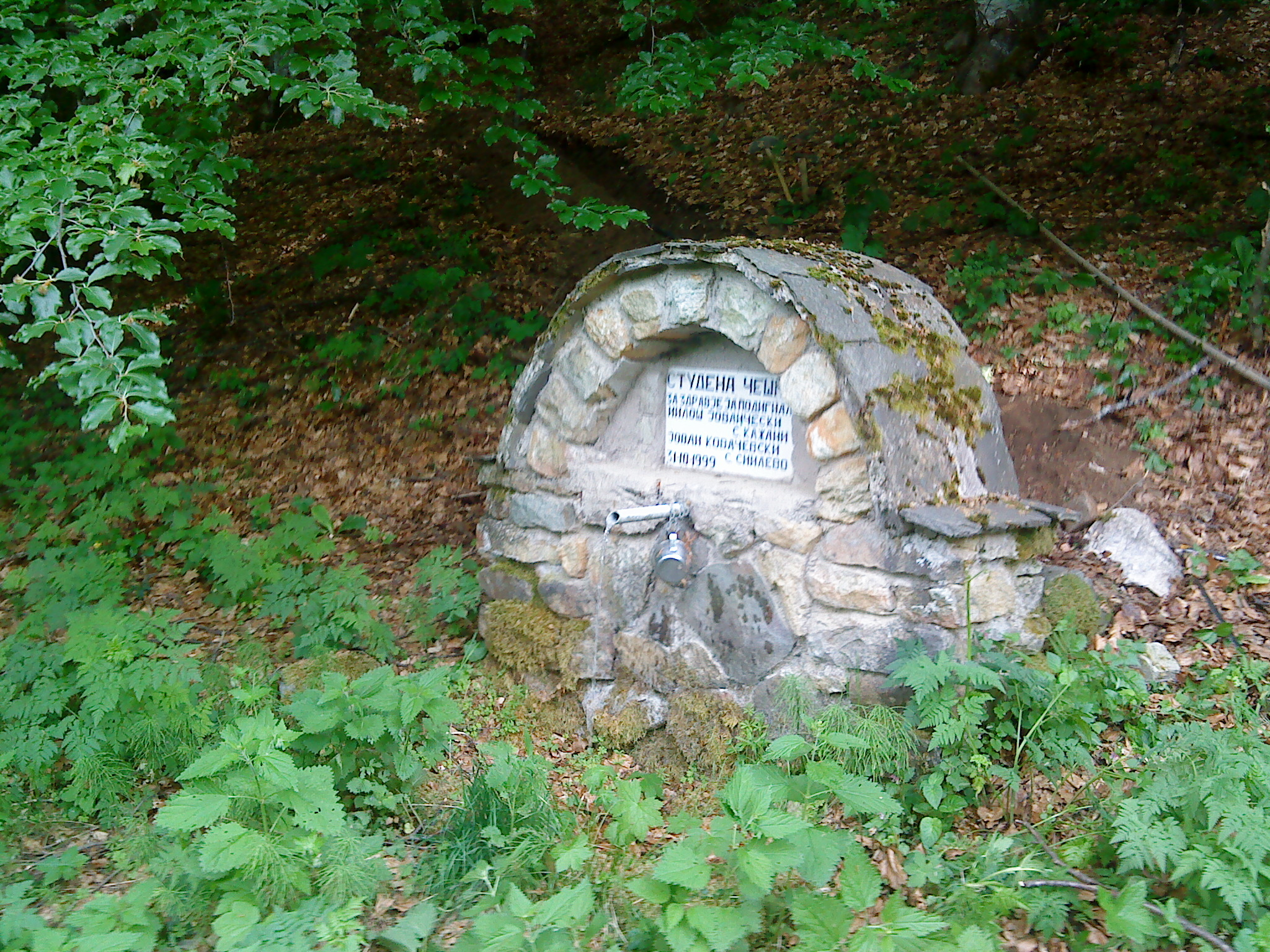 Студена Чешма